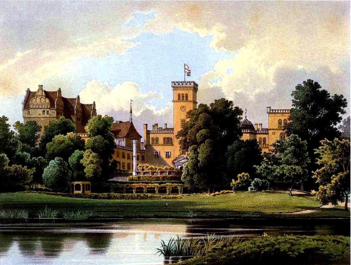 Schloss Boitzenburg, Kreis TemplinProvinz Brandenburg